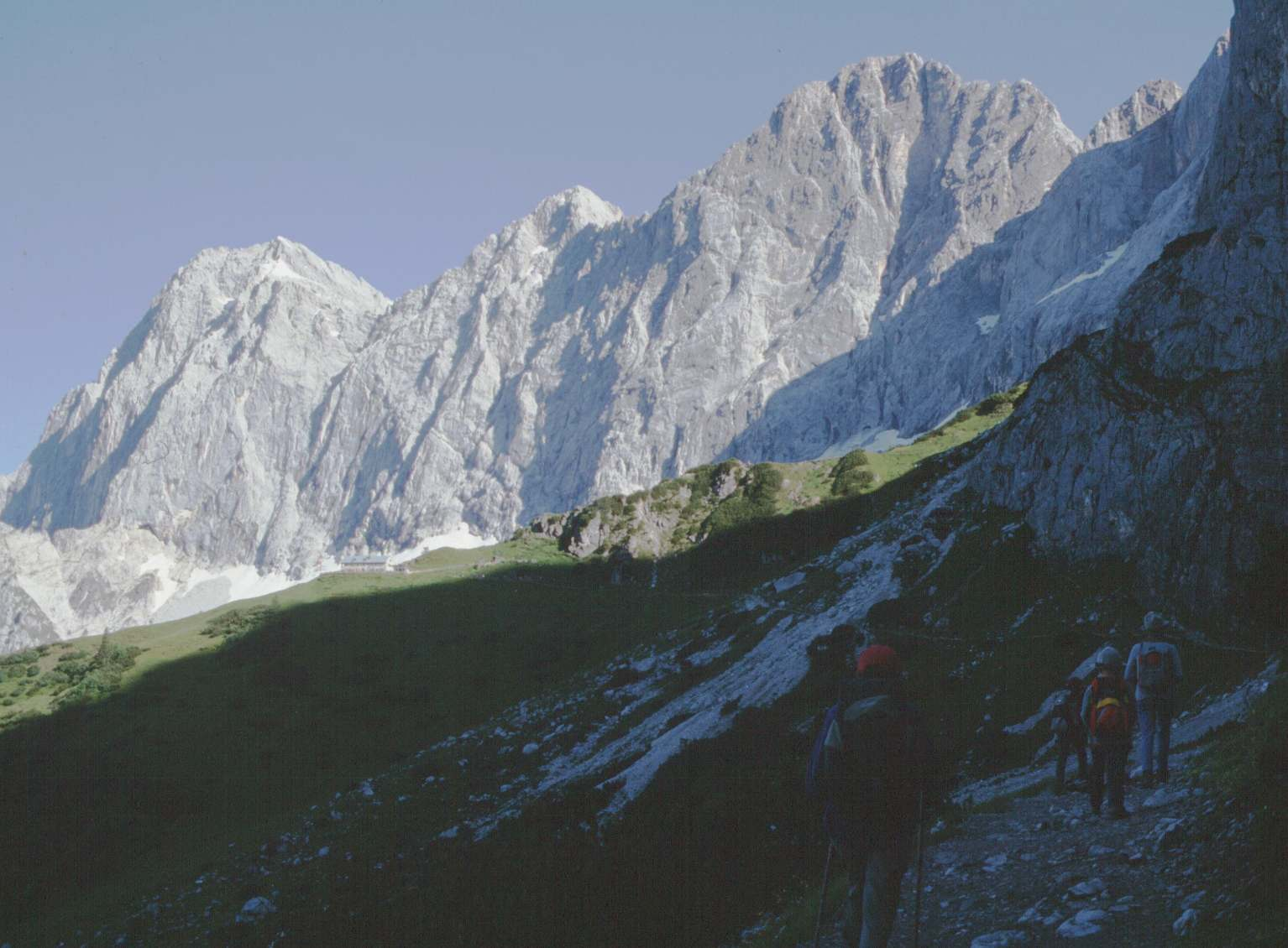 Dachsteinsüdwand Datum: Juli 2002 Qeulle: eigenes Foto Fotograf: Robert Lizenz: GNU/FDL